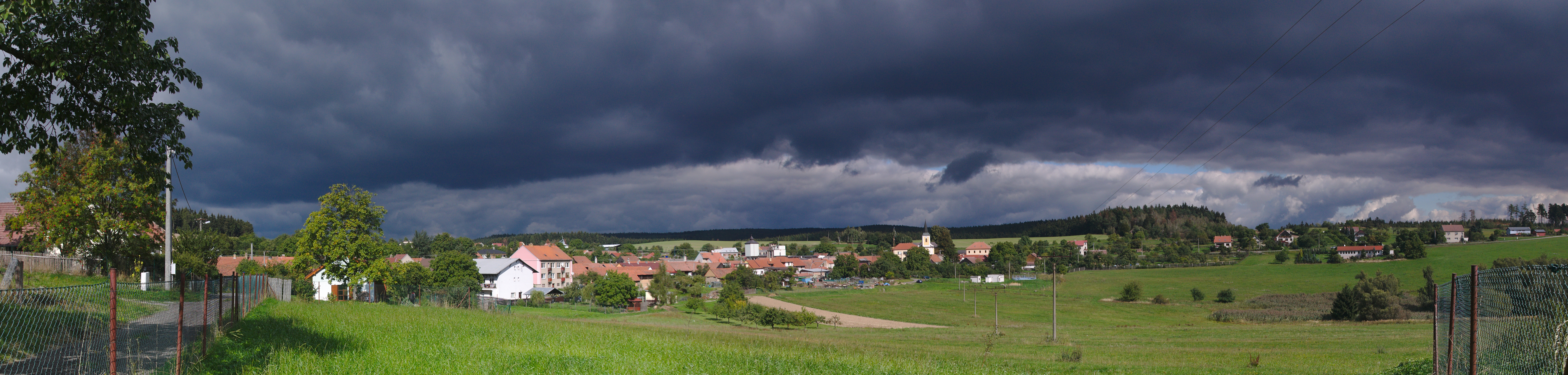 Panoramatický pohled na obec od jihovýchodu, Bedřichov, okres Blansko